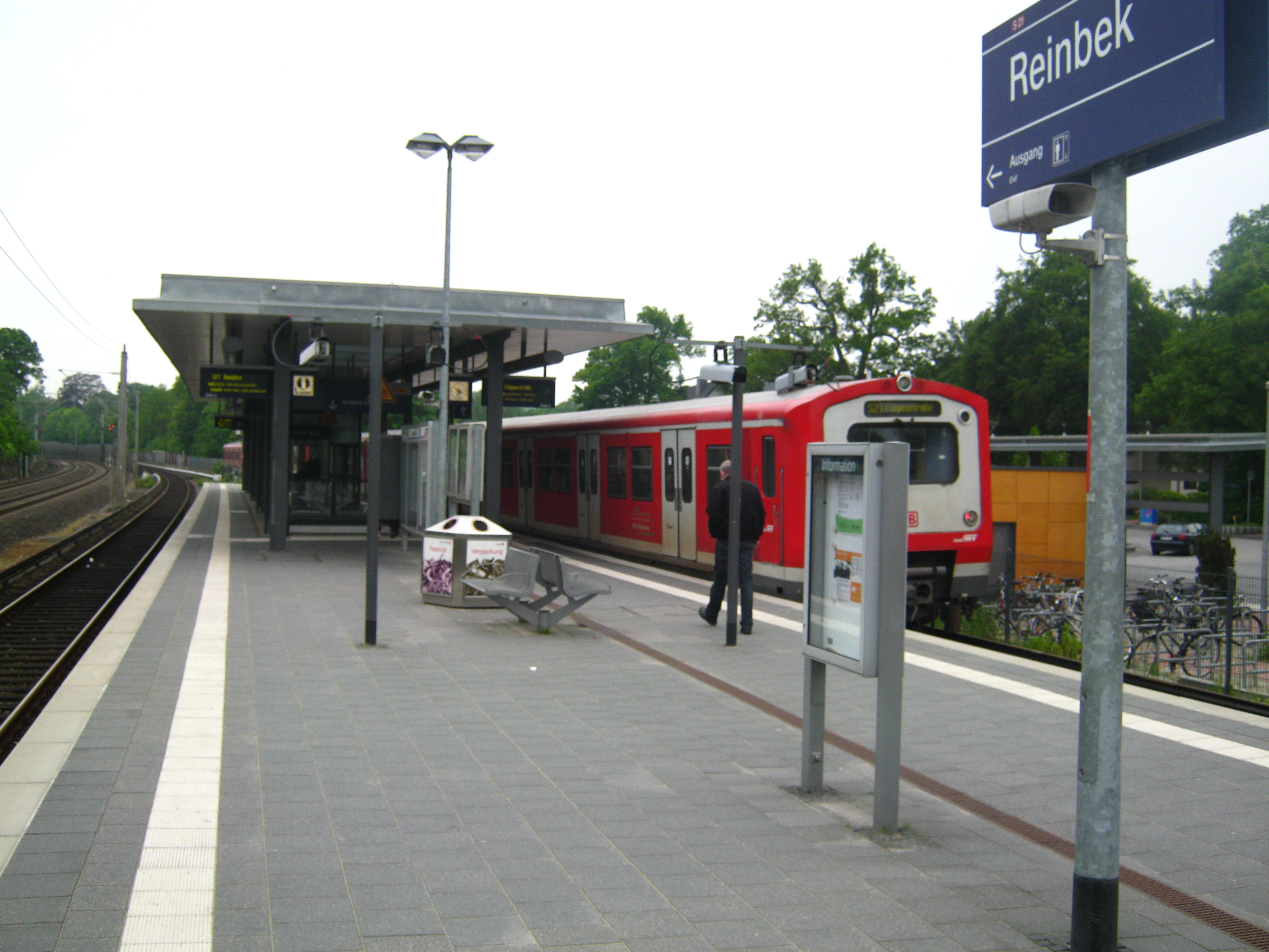 S-Bahn Station Reinbek.